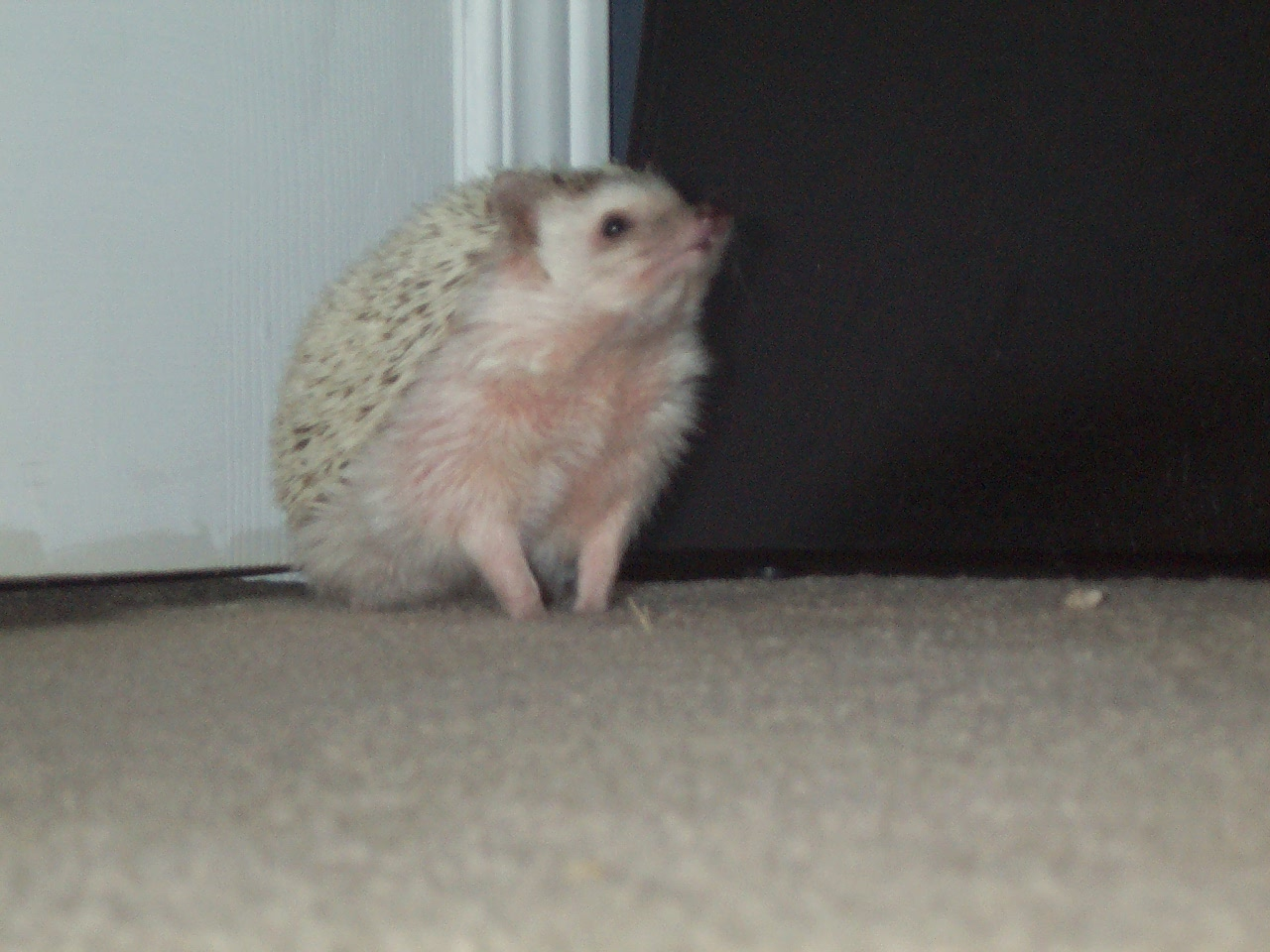 Female hedgehog smells something